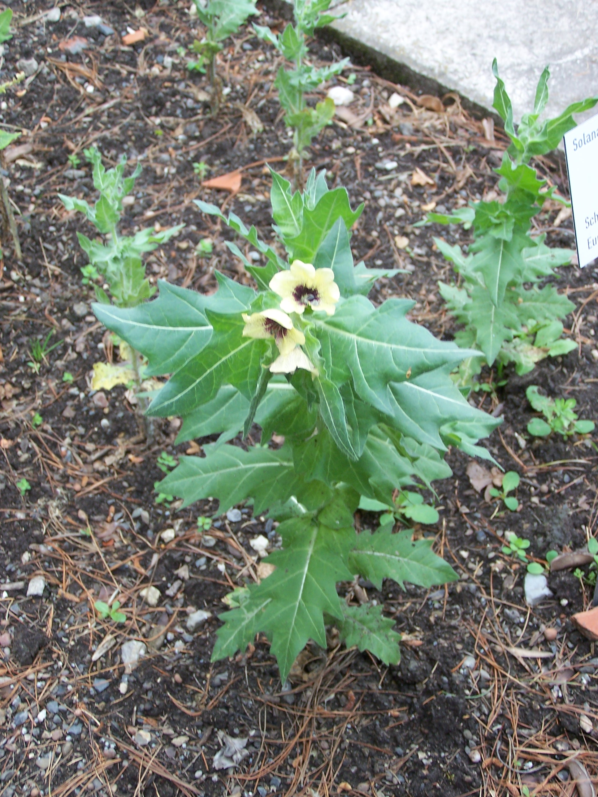 Hyoscyamus niger 17 juin 2006 Vieux jardin botanique de Göttingen